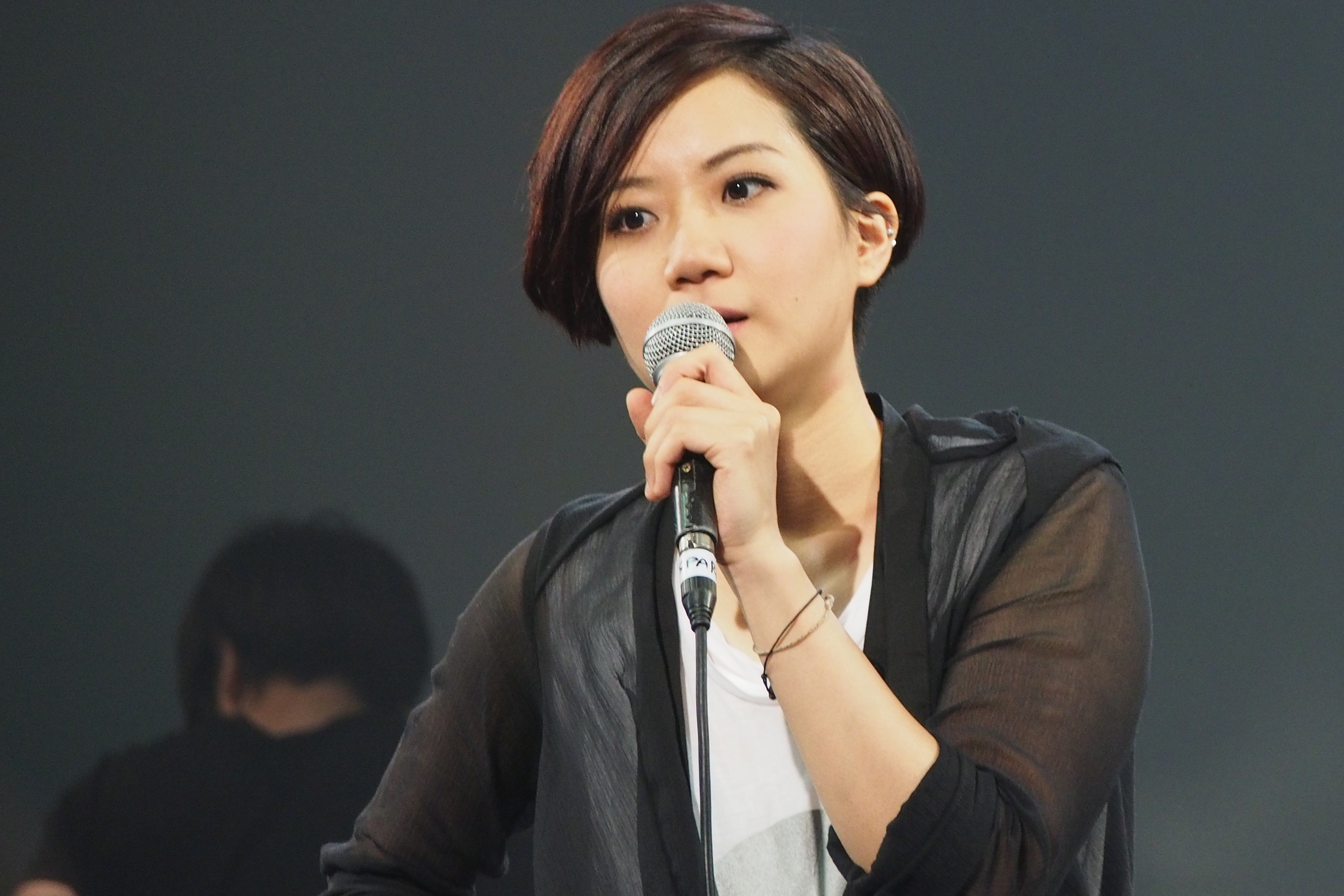 2013/5/31 @ Legacy Taipei